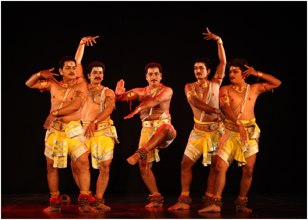 Perini Shiva Tandavam